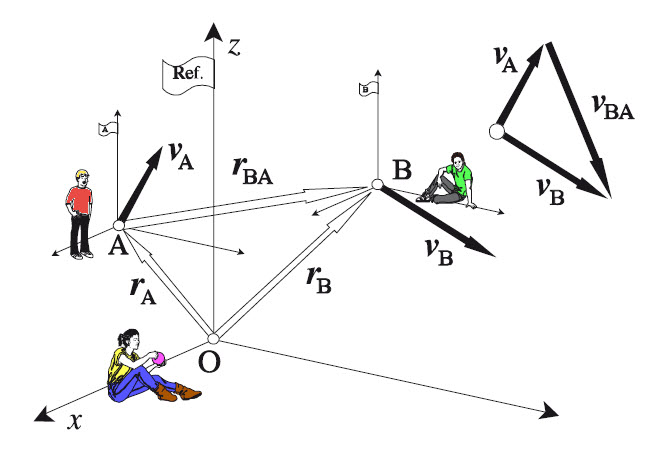 Movimiento relativo. Concepto de velocidad relativa.